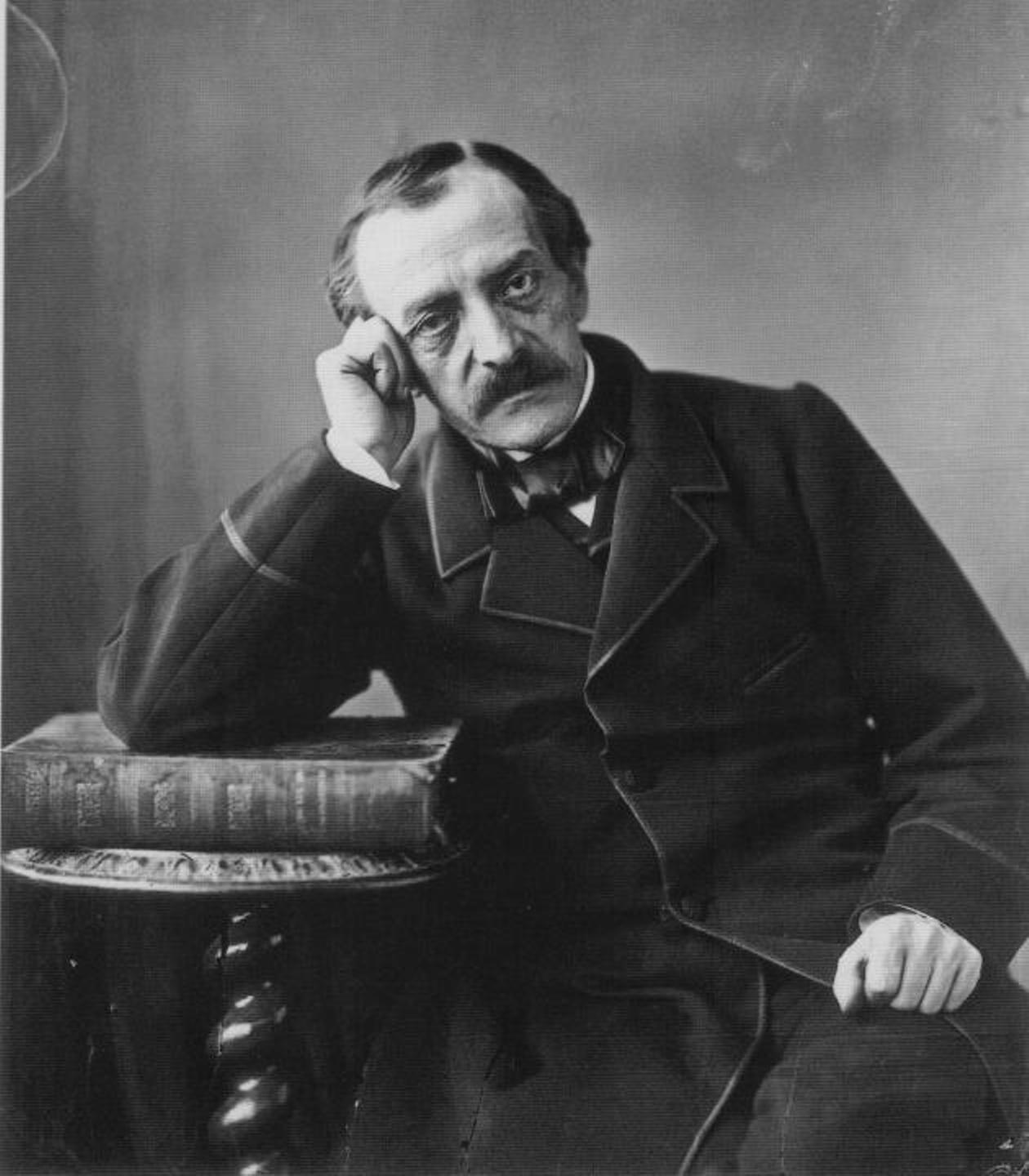 Alexandre Manceau (1817-1865) est un graveur et auteur dramatique français. Il a été pendant quinze ans l'ami de George Sand. Cette photographie est prise par Nadar, un an avant le décès d'Alexandre Manceau, épuisé par la maladie.